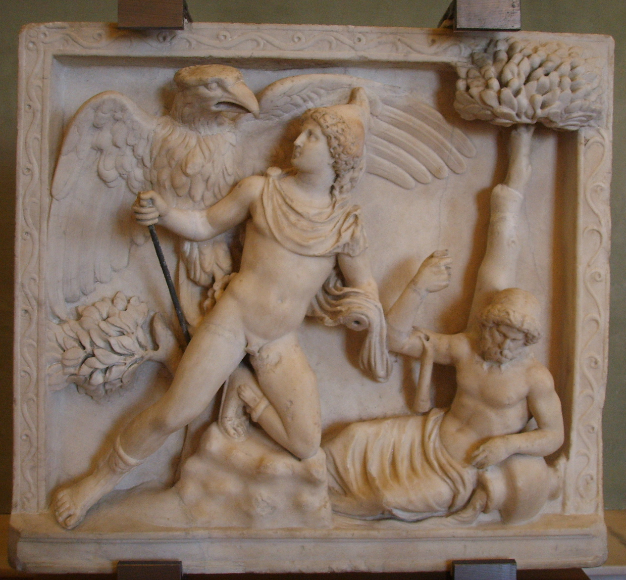 Rilievo romano con Ratto di Ganimede, del I secolo d.C., conservato a Firenze.